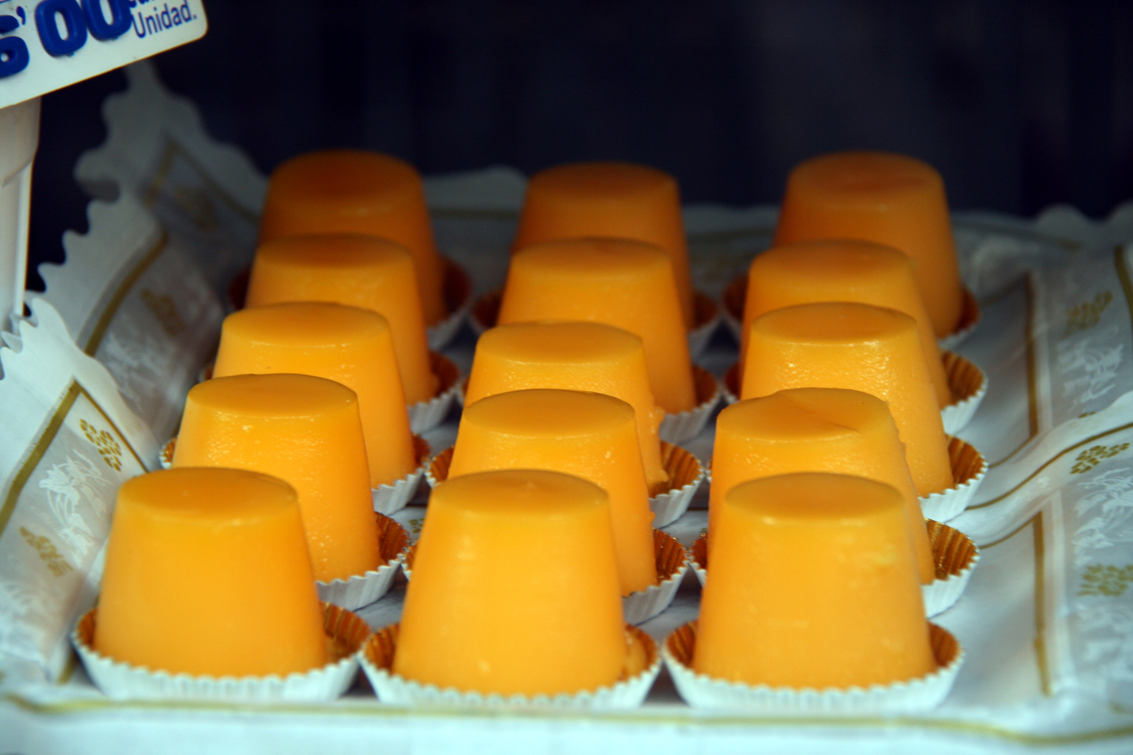 Tocinillos de cielo - Pastelería en Madrid